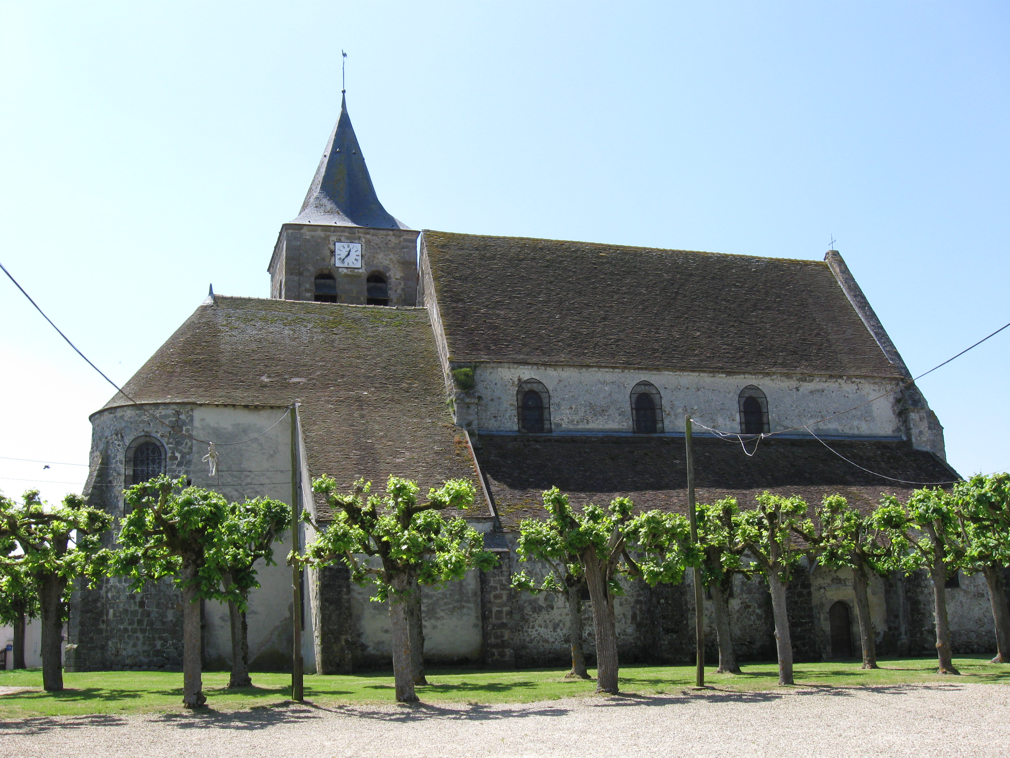 Église Notre-Dame-de-l’Assomption de Villenauxe-la-Petite. (département de la Seine-et-Marne, région Île-de-France).